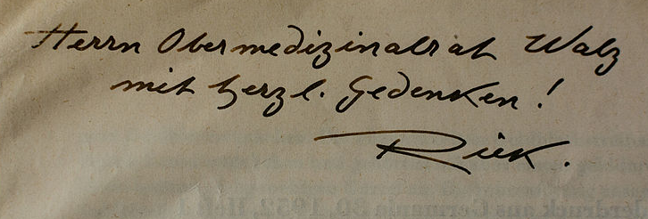 Inscription et signature de Gustav Riek au dos d'une publication dans le périodique Germania en 1952.